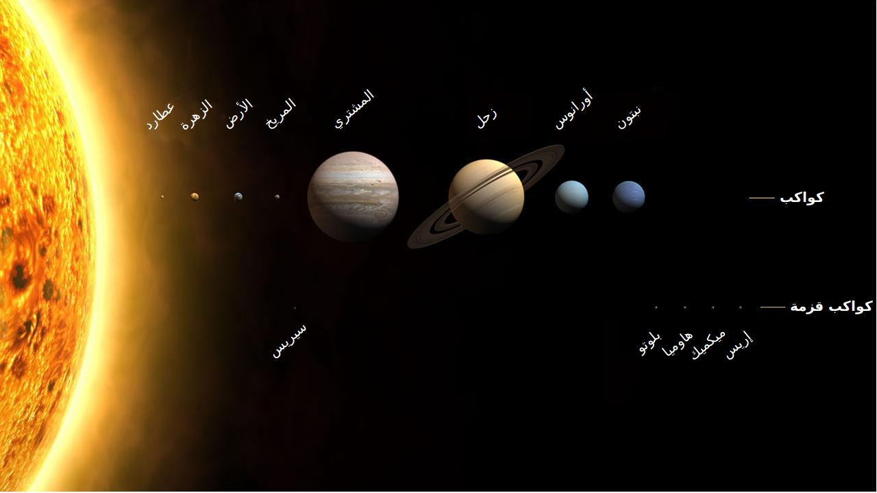 الكواكب والكواكب القزمة بالمجموعة الشمسية.